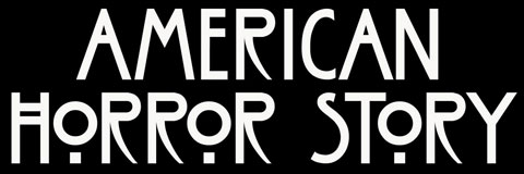 Diese Grafik zeigt das Logo der TV Serie American Horror Story